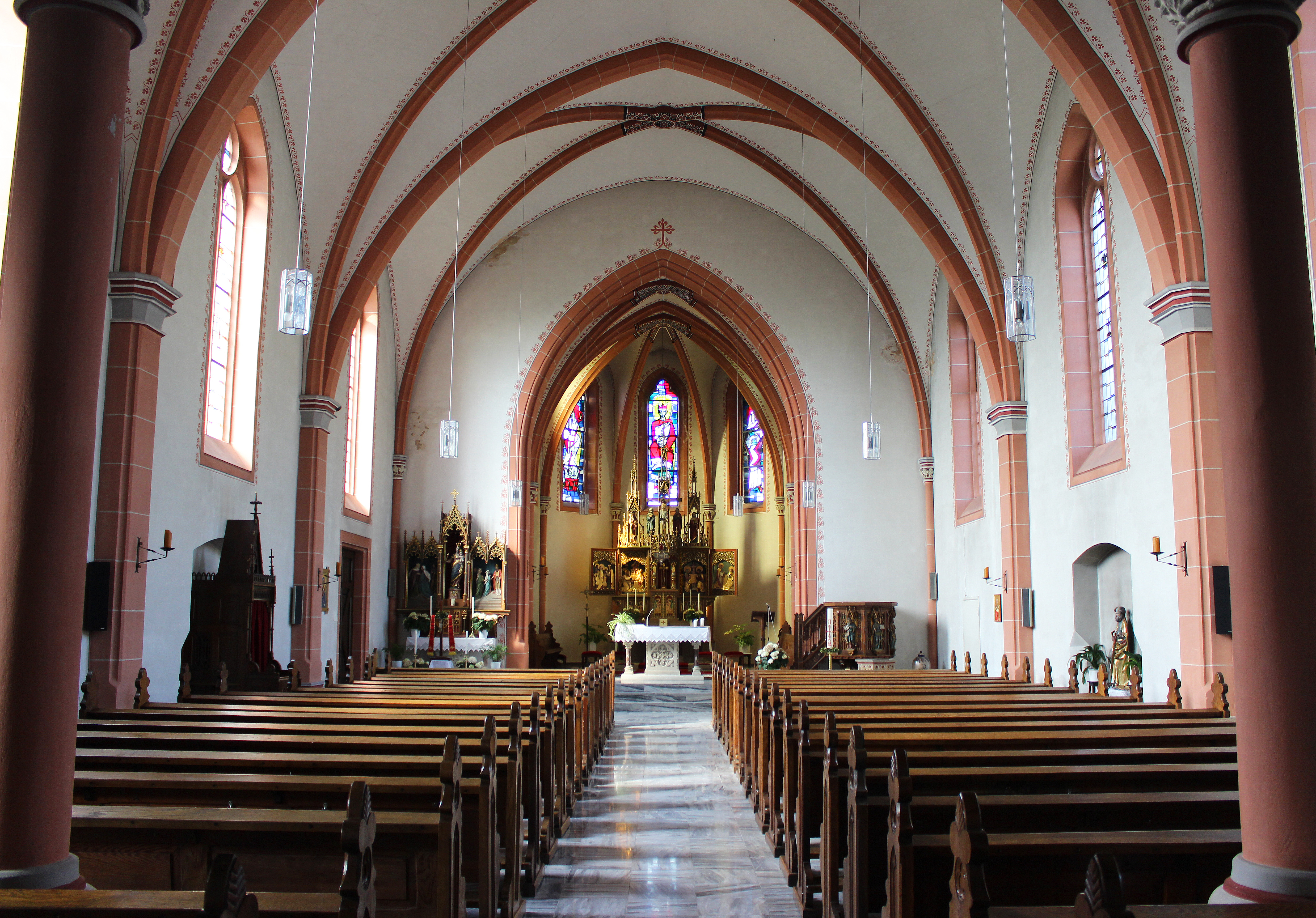 Blick ins Innere der katholischen Kirche St. Nikolaus in Felsberg, einem Ortsteil von Überherrn, Landkreis Saarlouis, Saarland